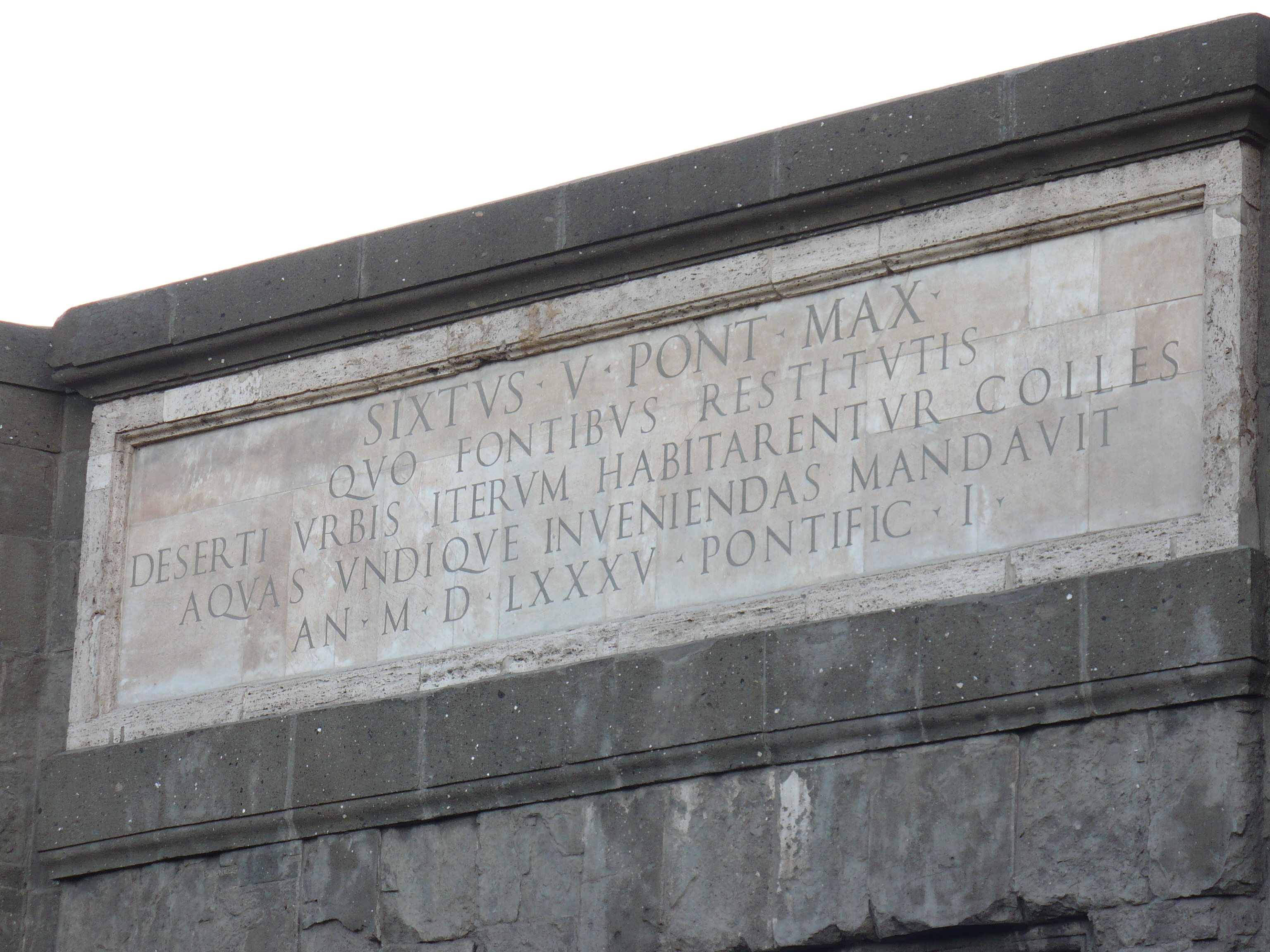 Arco di Sisto V, Porta Furba, Roma, Iscrizione lato 2, direzione centro